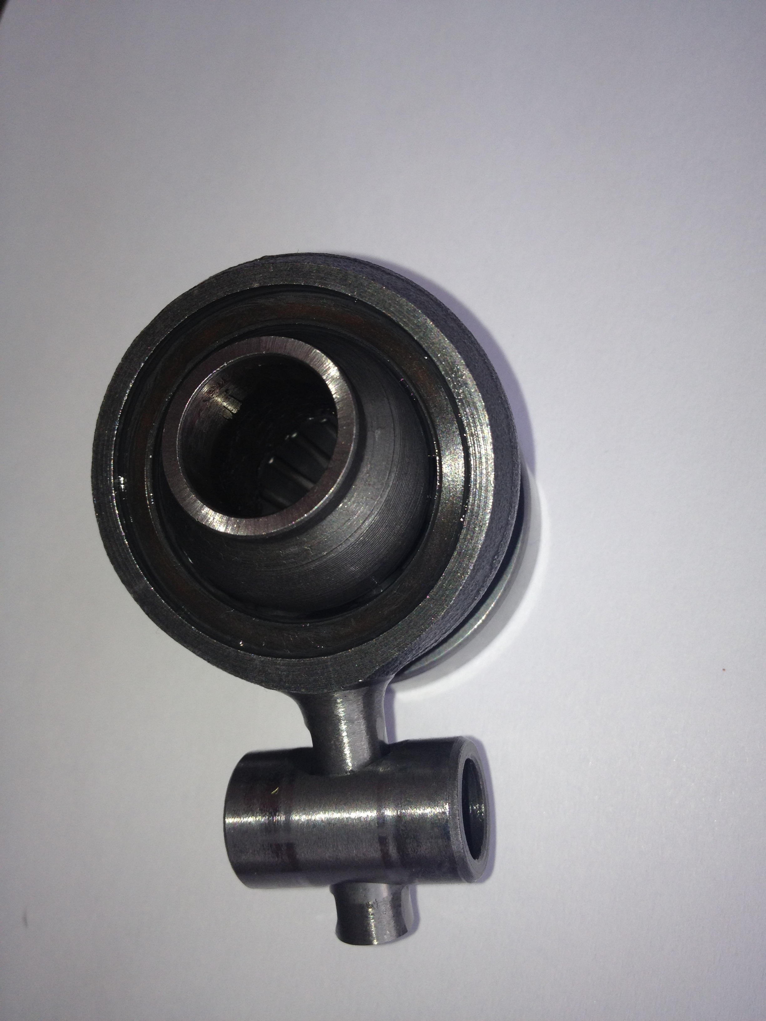 Между внутренним и внешним кольцами подшипника - защитная крышка.